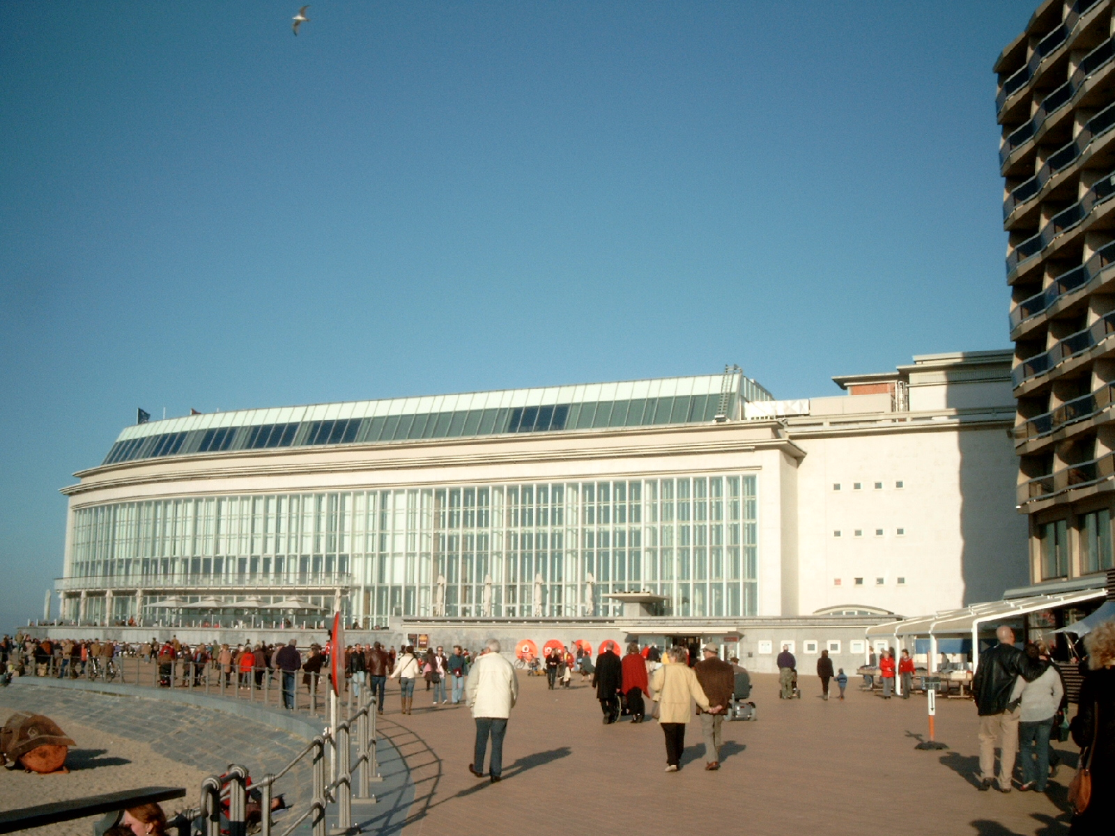 Gerestaureerd Casino Kursaal Oostende